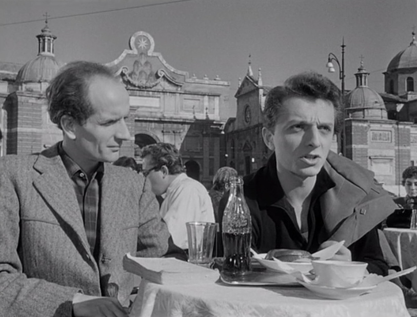 Screenshot dal film L'arte di arrangiarsi (1954)